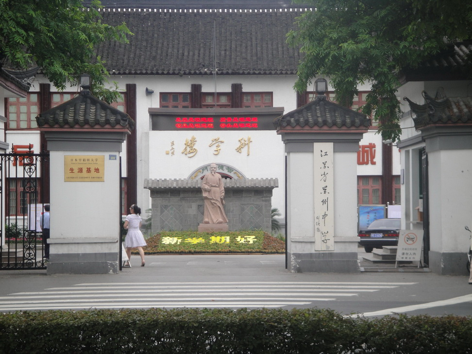 苏州中学校门